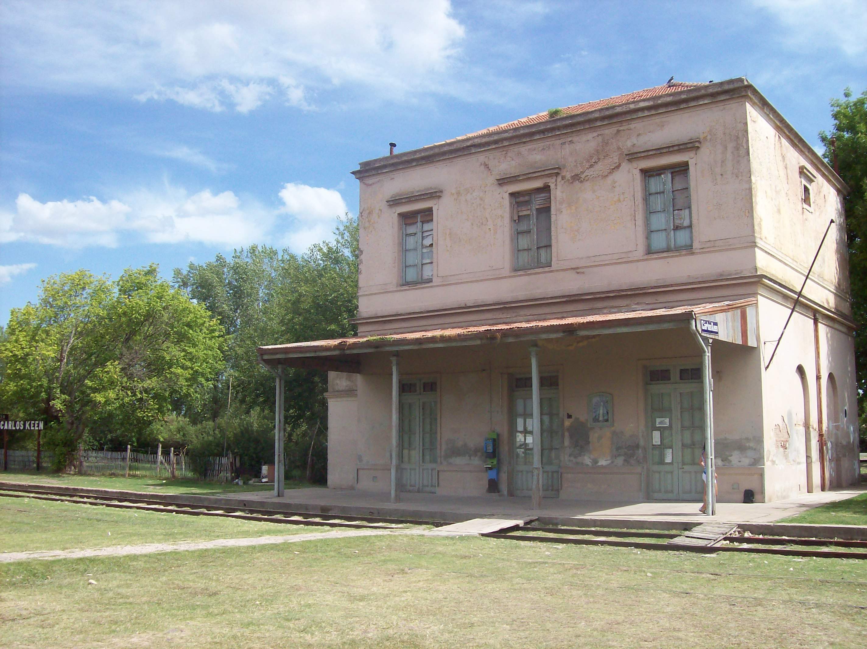 Estación de tren Carlos Keen, en la ciudad homónima, Partido de Luján, Provincia de Buenos Aires, Argentina